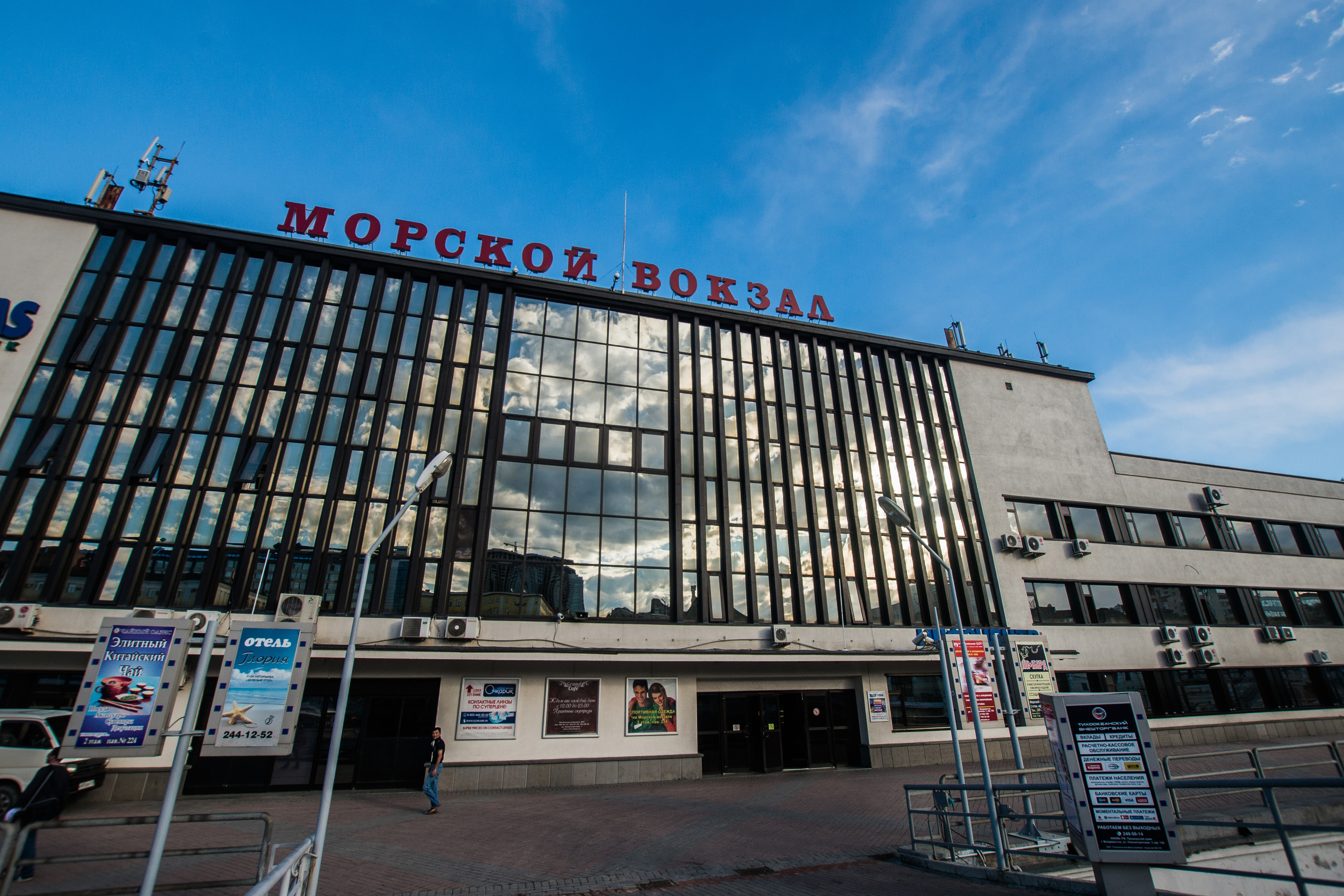 Здание морского вокзала (Приморский край, Владивосток, нижнепортовая улица, 3)